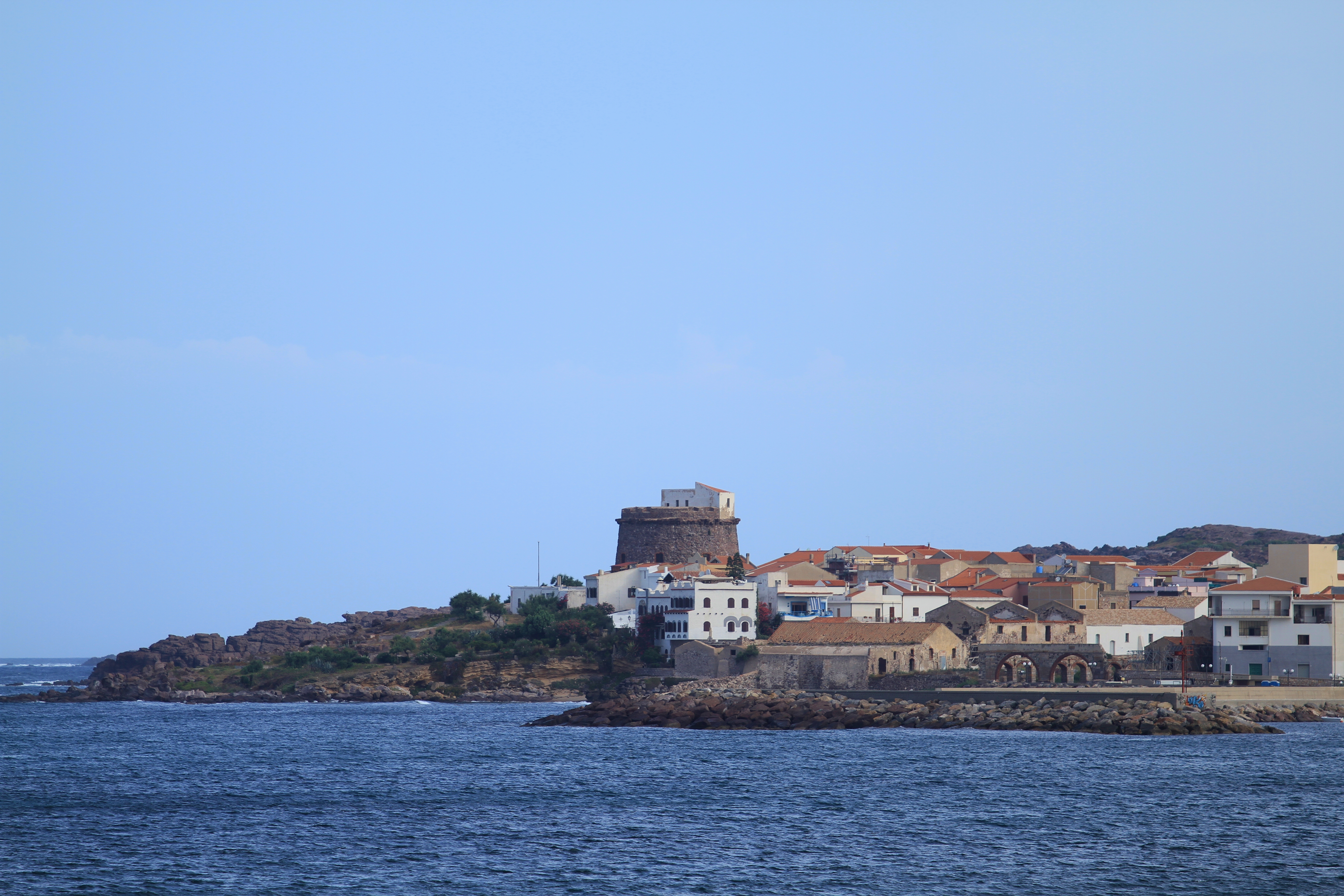 Torre di Portoscuso, Portoscuso, Carbonia-Iglesias, Sardinia, Italy